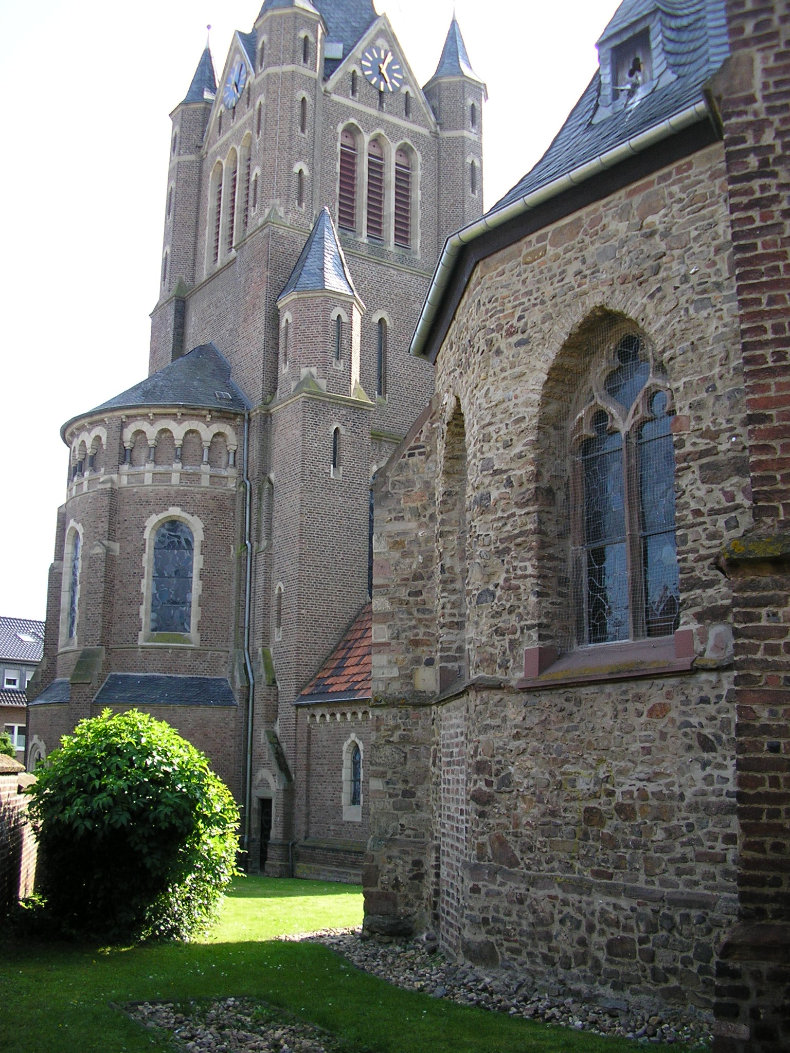 Klein St. Arnold (Arnoldsweiler)